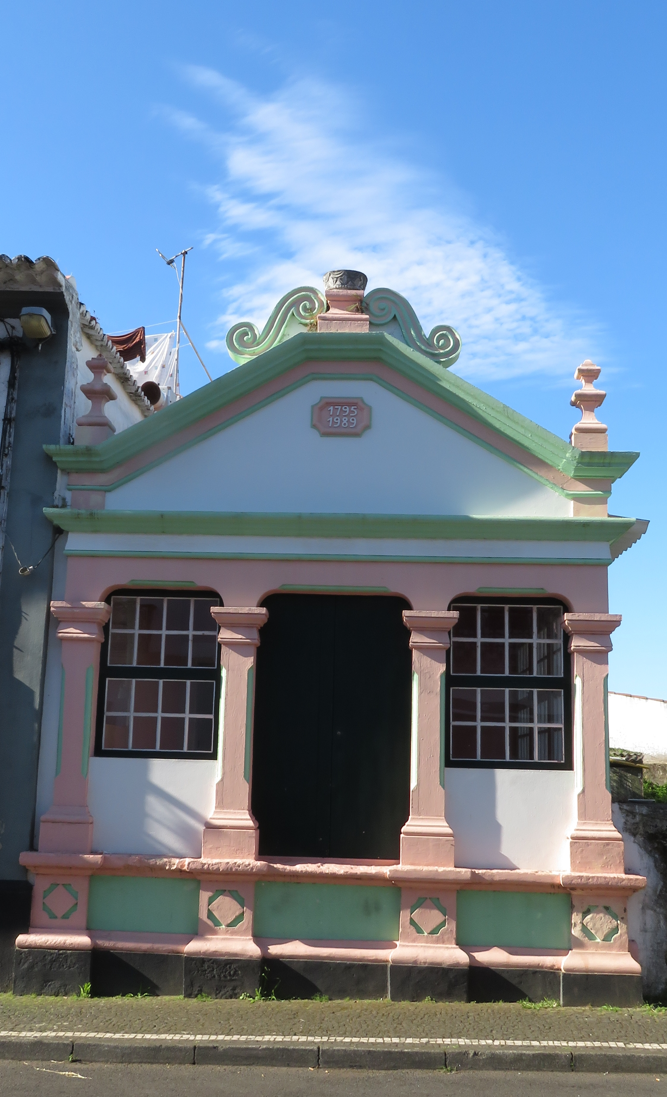 Heilig-Geist-Kapelle "Império do Espírito Santo da Rua de S. Pedro", 1795 erbaut, im Stadtteil S. Pedro, Angra do Heroísmo, Insel Terceira, Azoren, Portugal